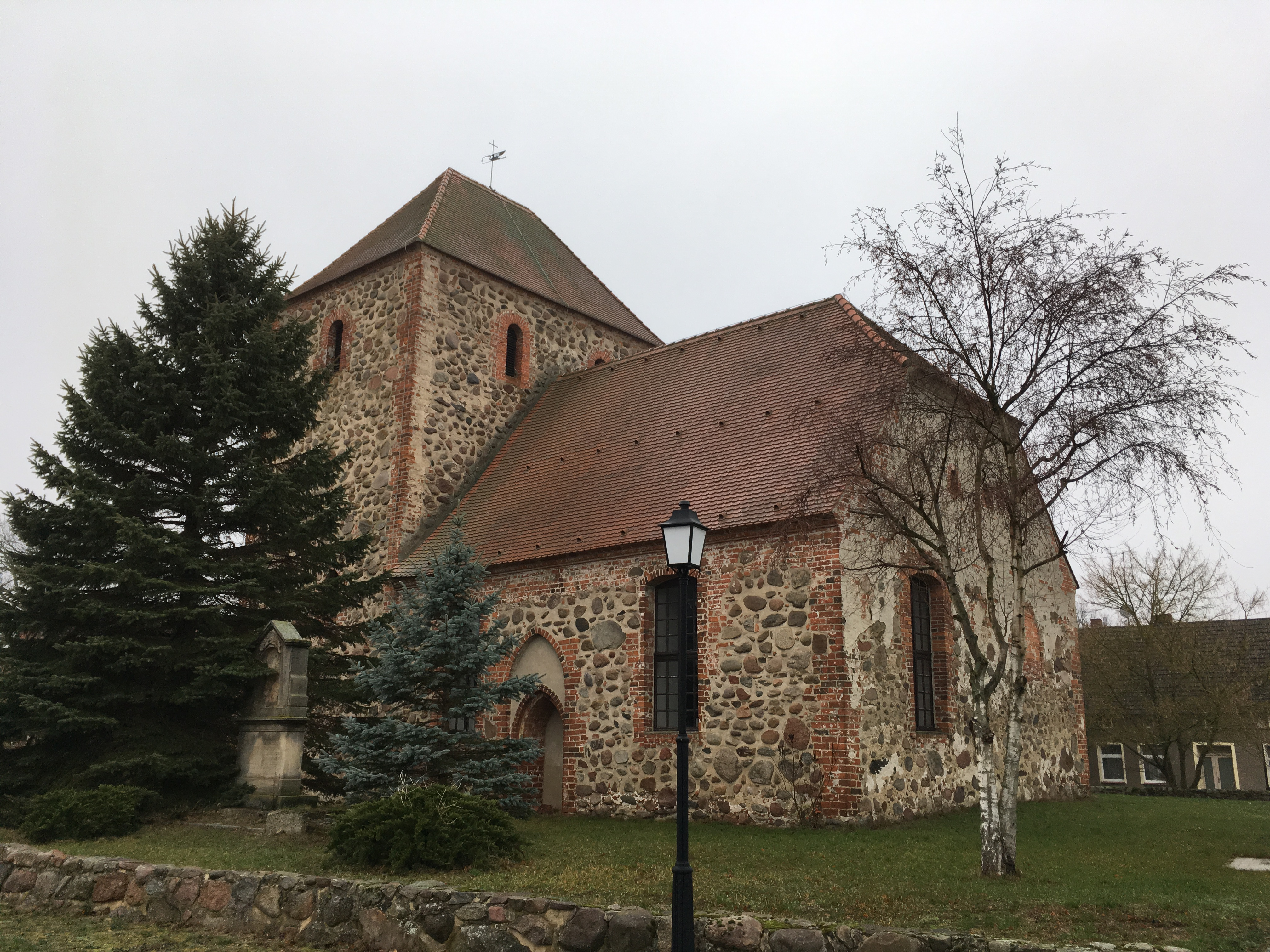 Die Feldsteinkirche in Schweinrich, Wittstock/Dosse entstand vermutlich im 15. Jahrhundert. Im Innern steht unter anderem ein Altarretabel aus dem ersten Viertel des 17. Jahrhunderts.